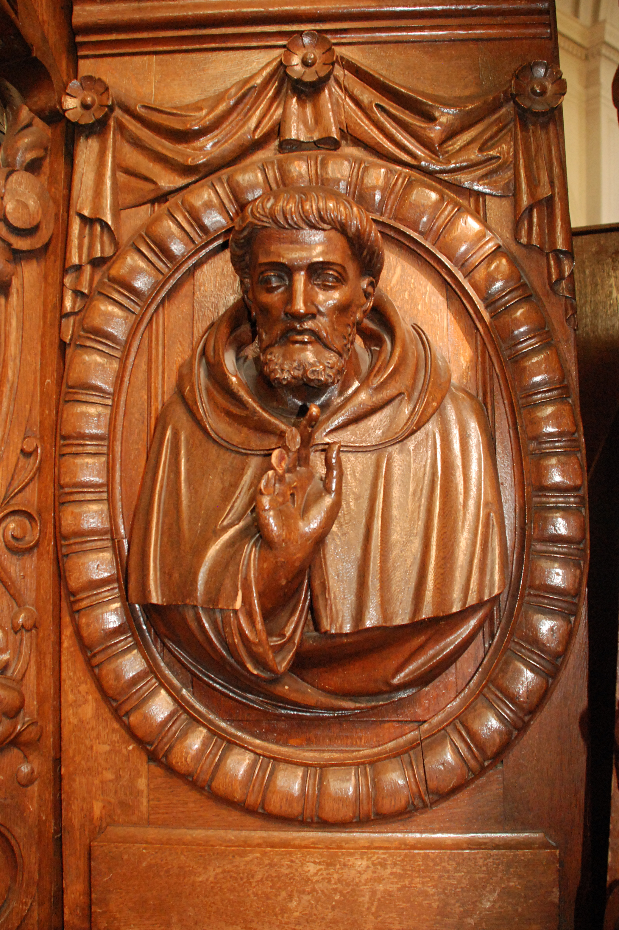 Belgique - Bousval - Église Saint-Barthélemy de Bousval